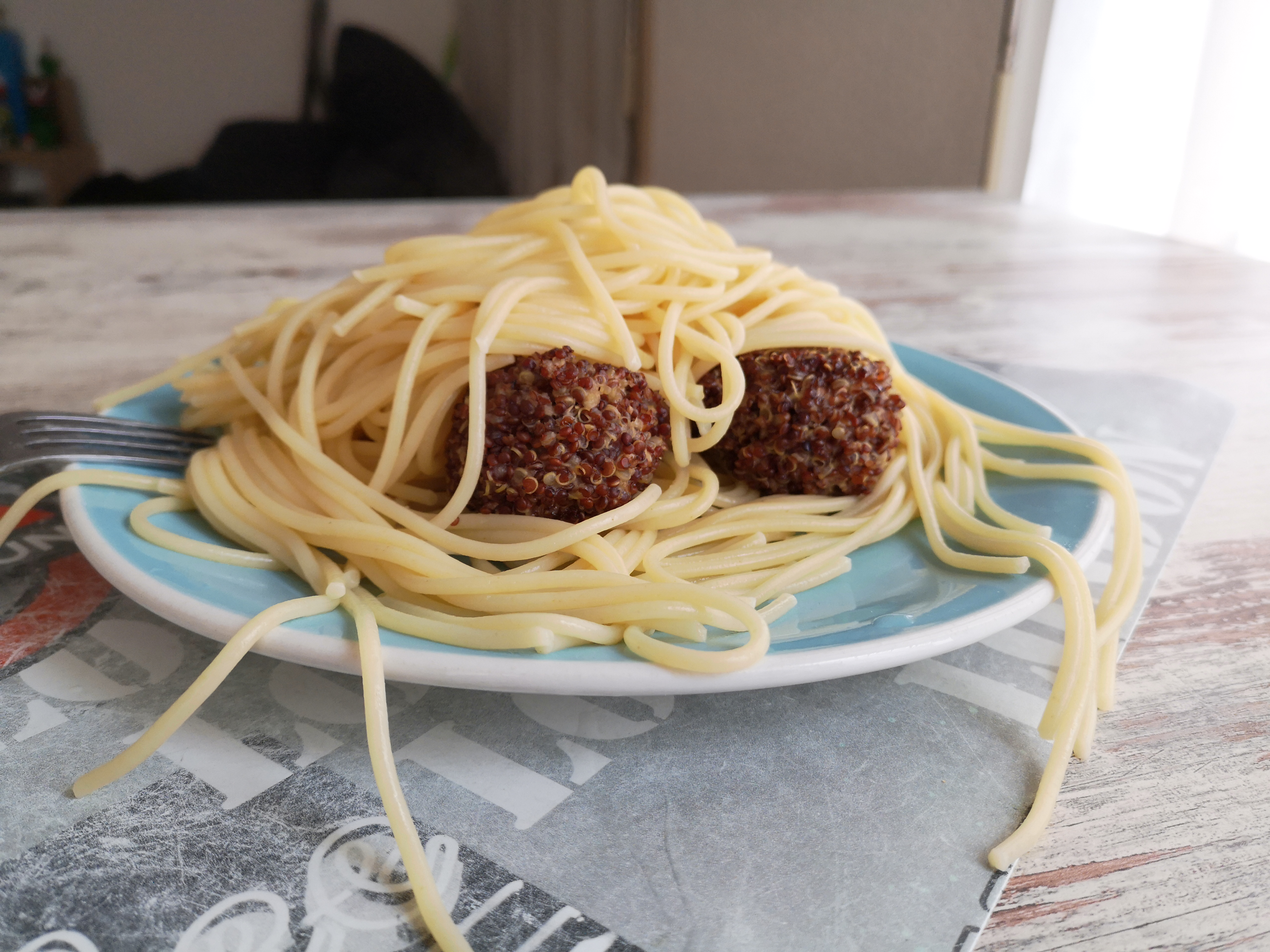 Mise en scène d'une authentique apparition de Flying Spaghetti Monster dans un plat de pâtes au quinoa.